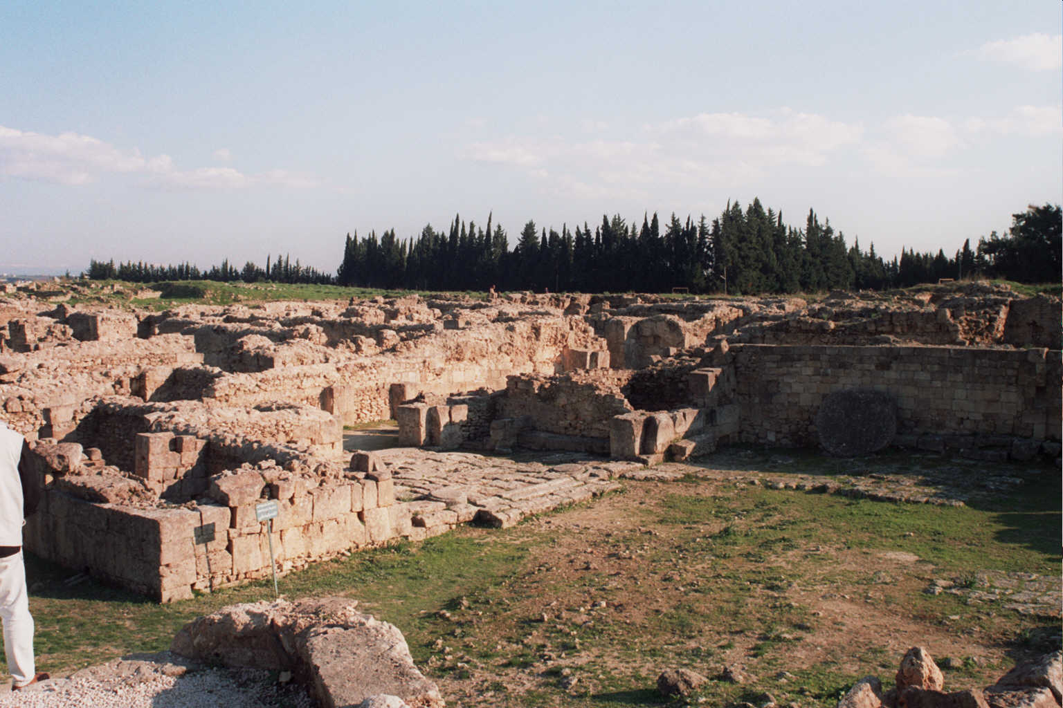 Loris Romito Viaggio in Siria - 2005